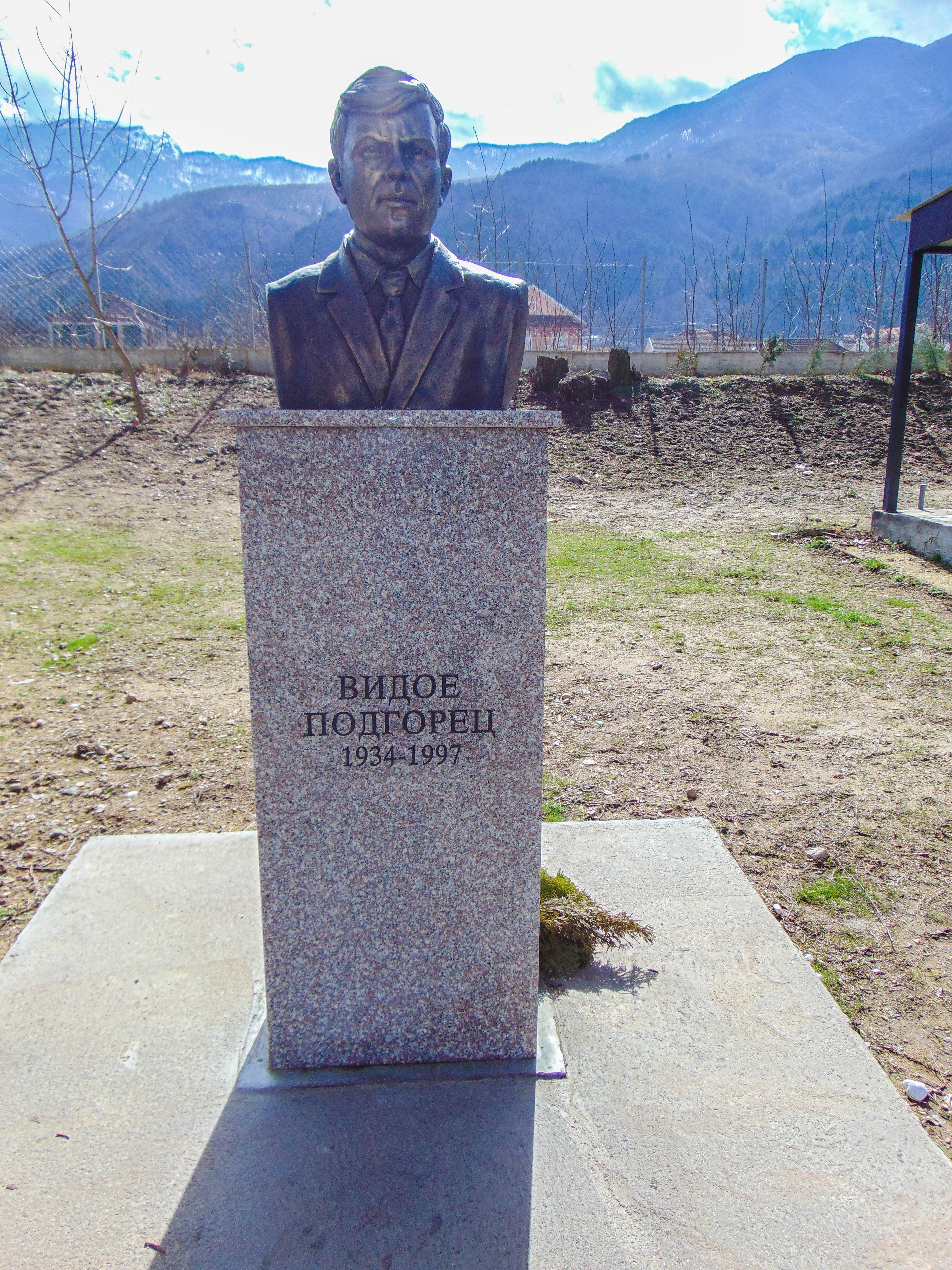 Статуа од Видое Подгорец